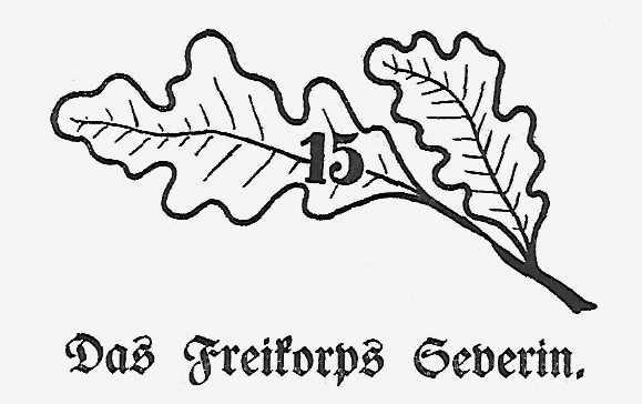 Abzeichen des "Freikorps Severin"